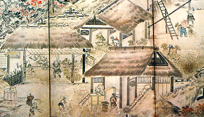 Ширма «Сільськогосподарський рік», на якій зображена молотьба рису для виготовлення саке. Історичний музей виробництва саке Айдзу.